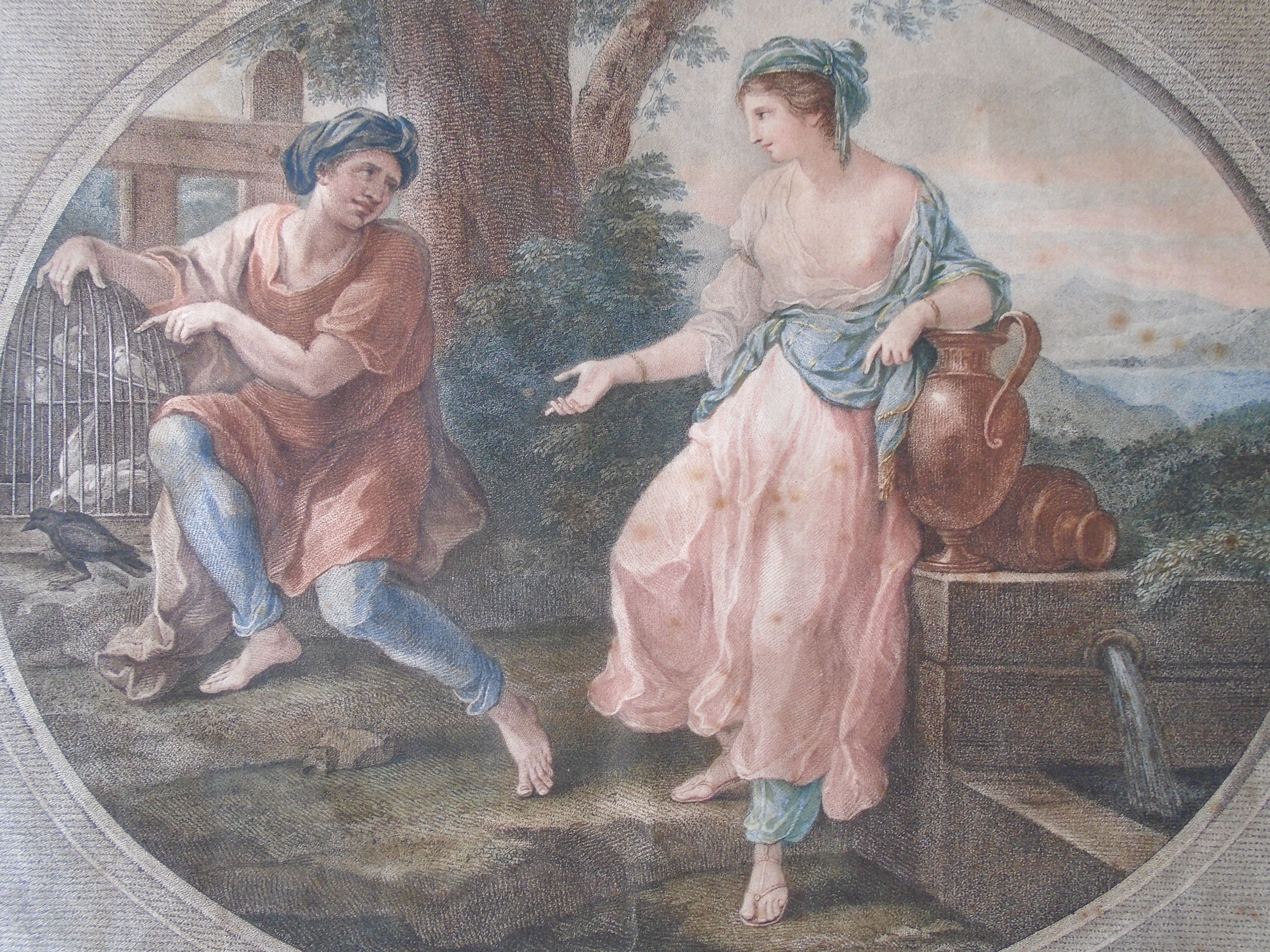 Фр. Бартолоцци с оригинала А.Кауфманн. 316X383. Гравюра в размер оригинала пунктир, печать с трех досок